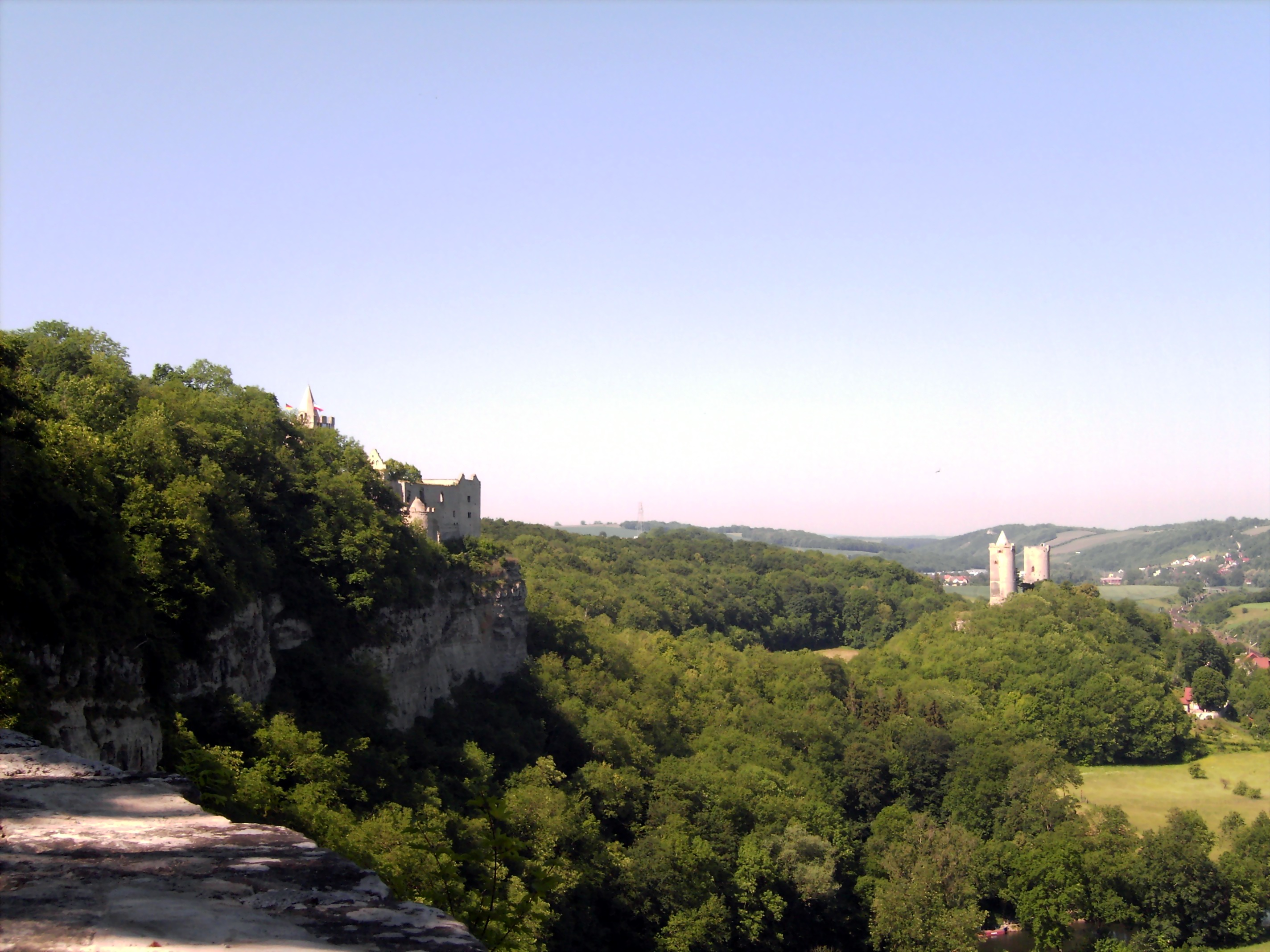 Rudelsburg und Saaleck vom Löwendenkmal aus gesehen